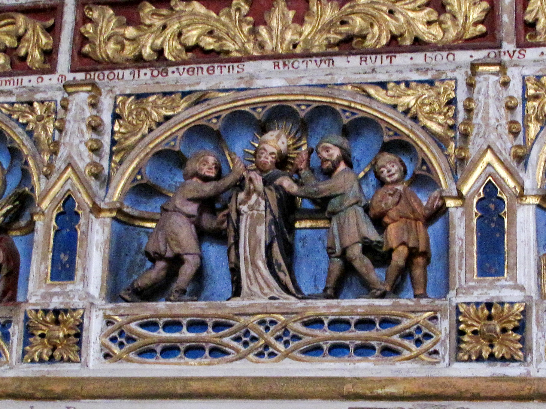 Vicenza - Chiesa di S. Maria Annunciata - Pala della Cappella dell'Incoronata (dettaglio) - Assassinio del vescovo Cacciafronte